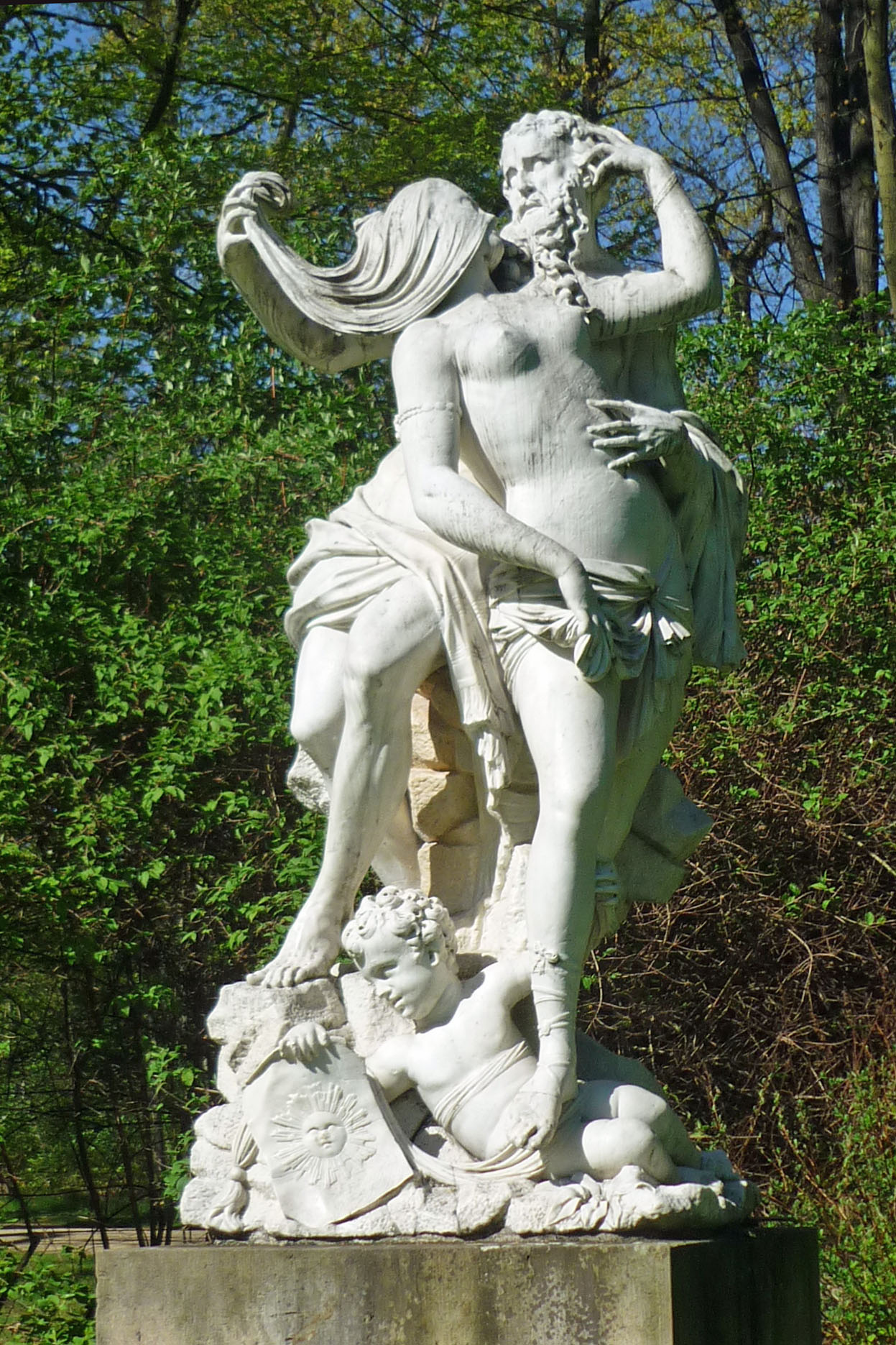 Skulptur „Die Zeit enthüllt die Wahrheit“ von Antonio Corradini im Großen Garten in Dresden